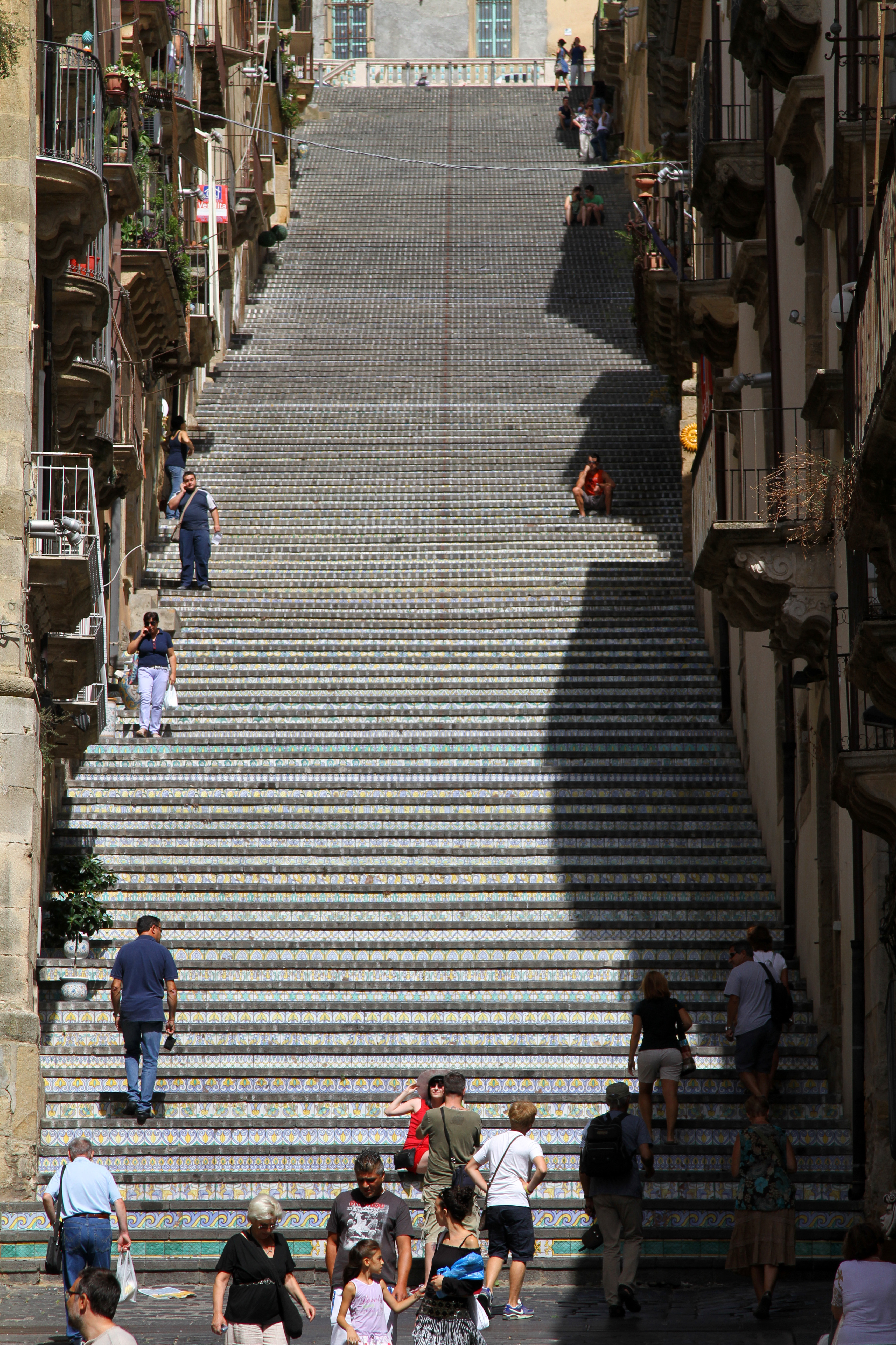 Caltagirone: la Scala di Santa Maria del Monte